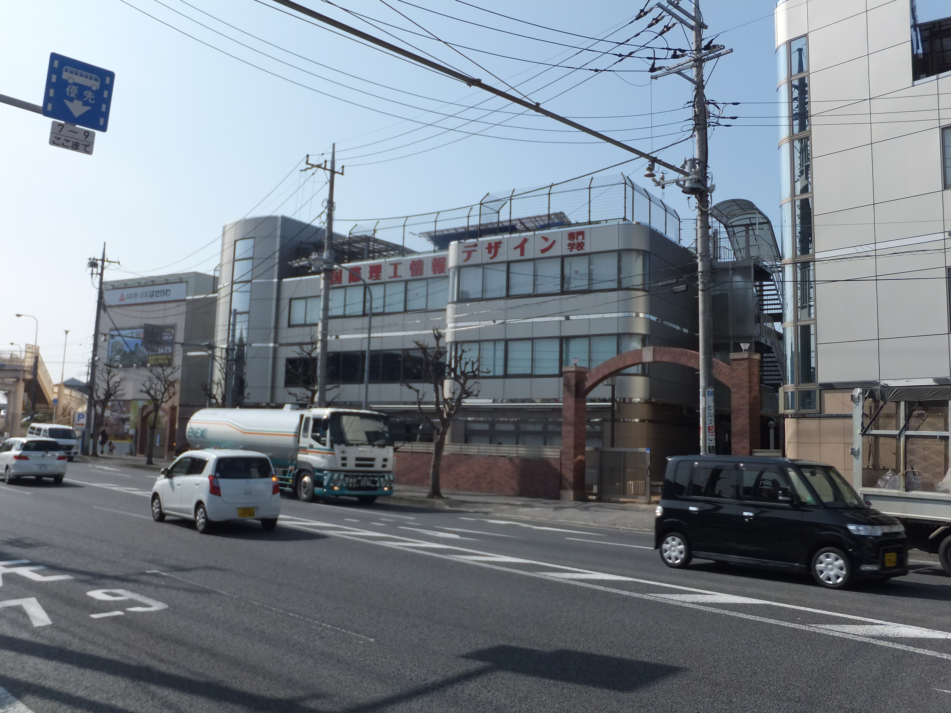 国際理工情報デザイン専門学校（千葉市稲毛区）